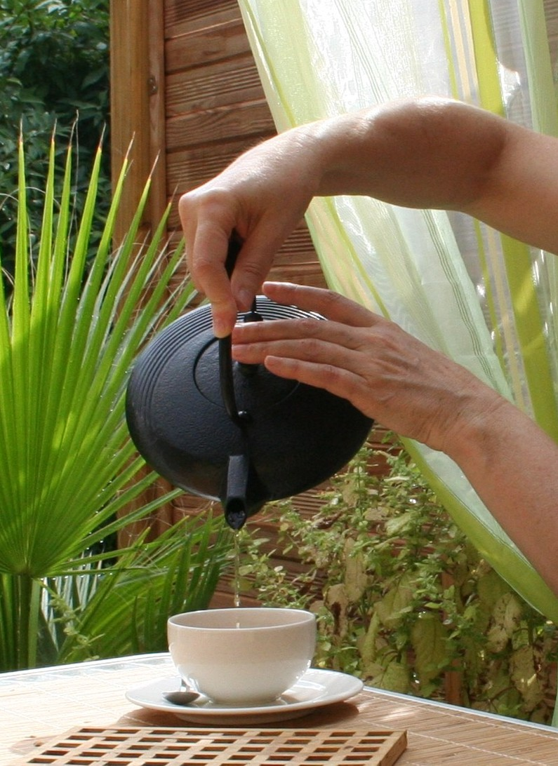 Teepause, japanischer Teekanne aus Gusseisen